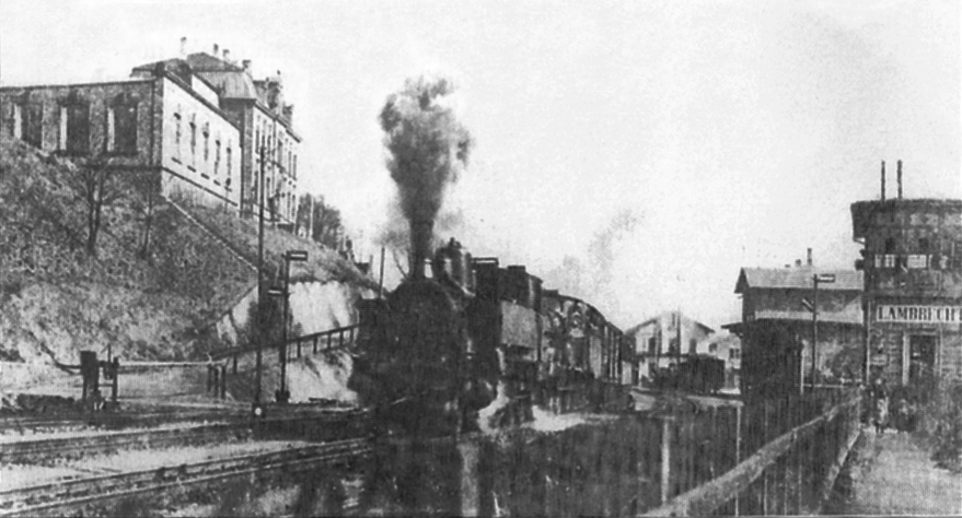 Bf. Lambrecht um 1910